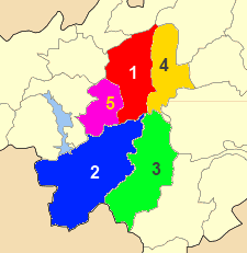 Χάρτης των ενοτήτων (και πρώην δήμων) από τις οποίες αποτελείται ο Δήμος Καρδίτσας